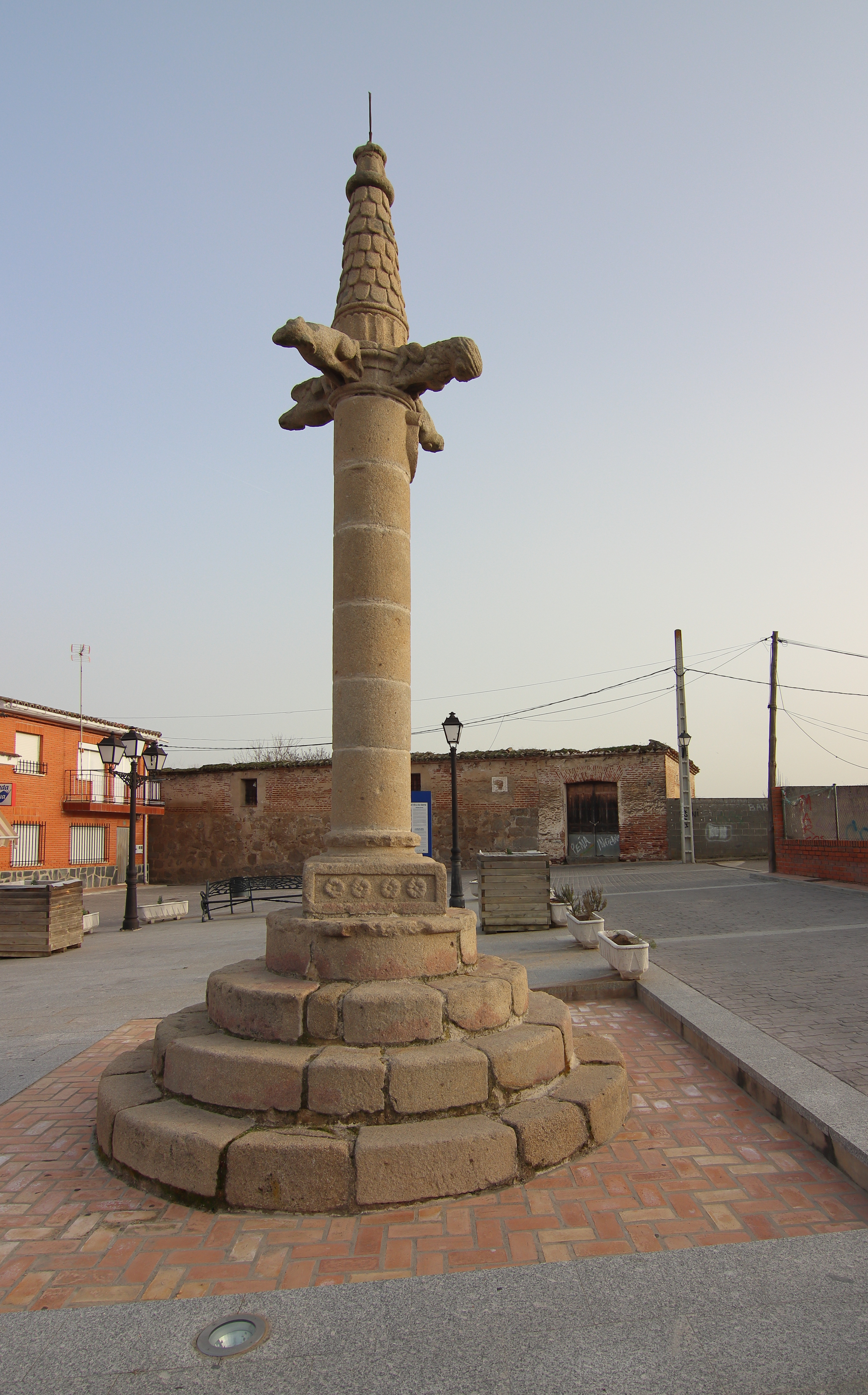 Picota o rollo, Cardiel de los Montes, 01